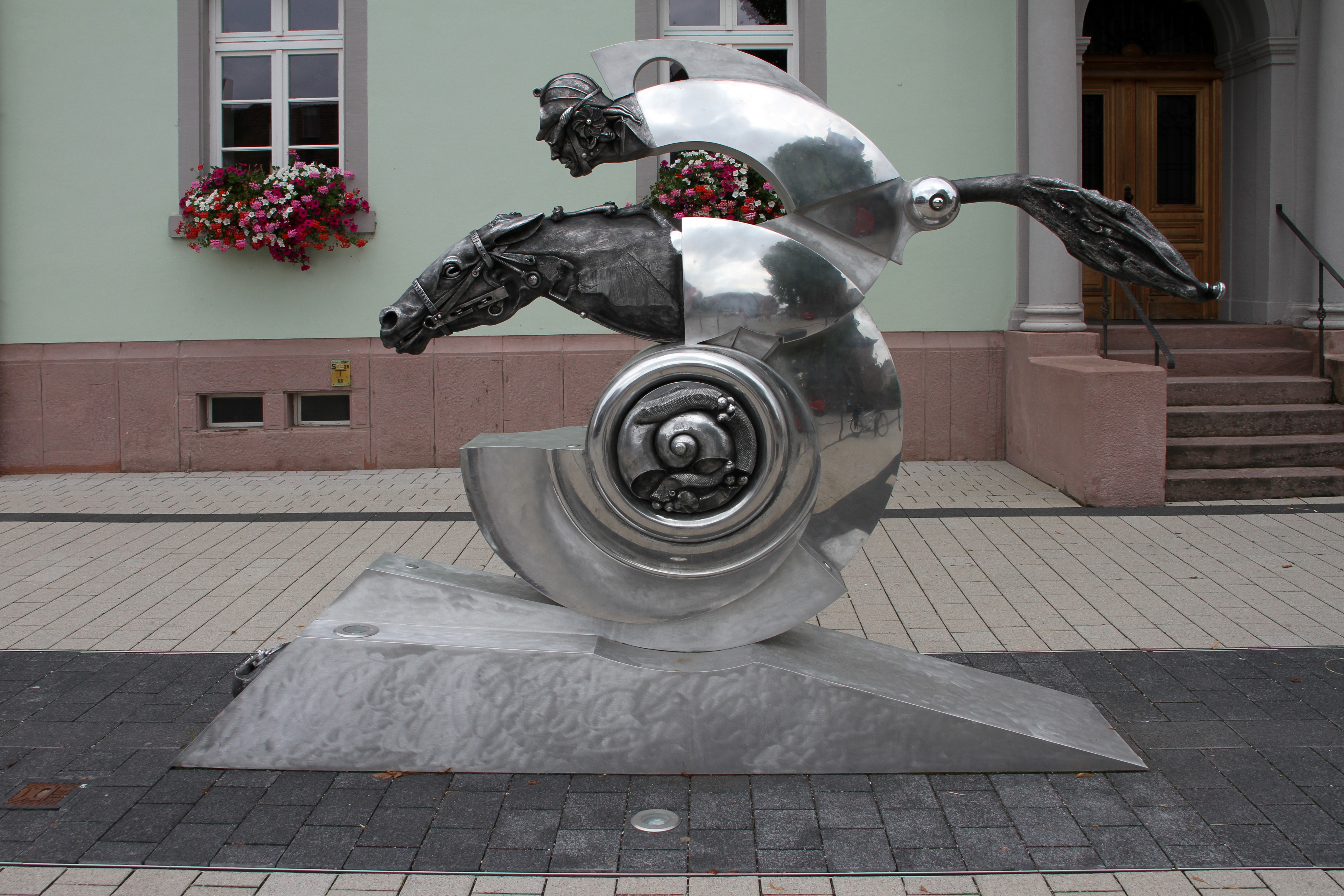 Skulptur "Racing 2013" von Jürgen Goertz vor dem Rathaus in Iffezheim.